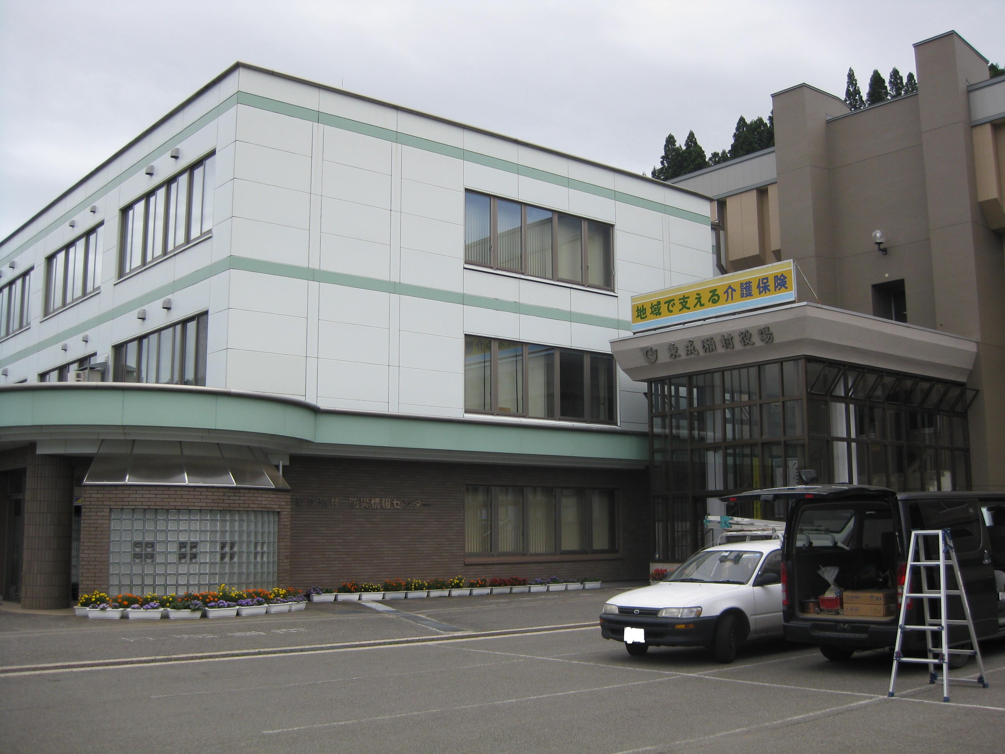 東成瀬村役場